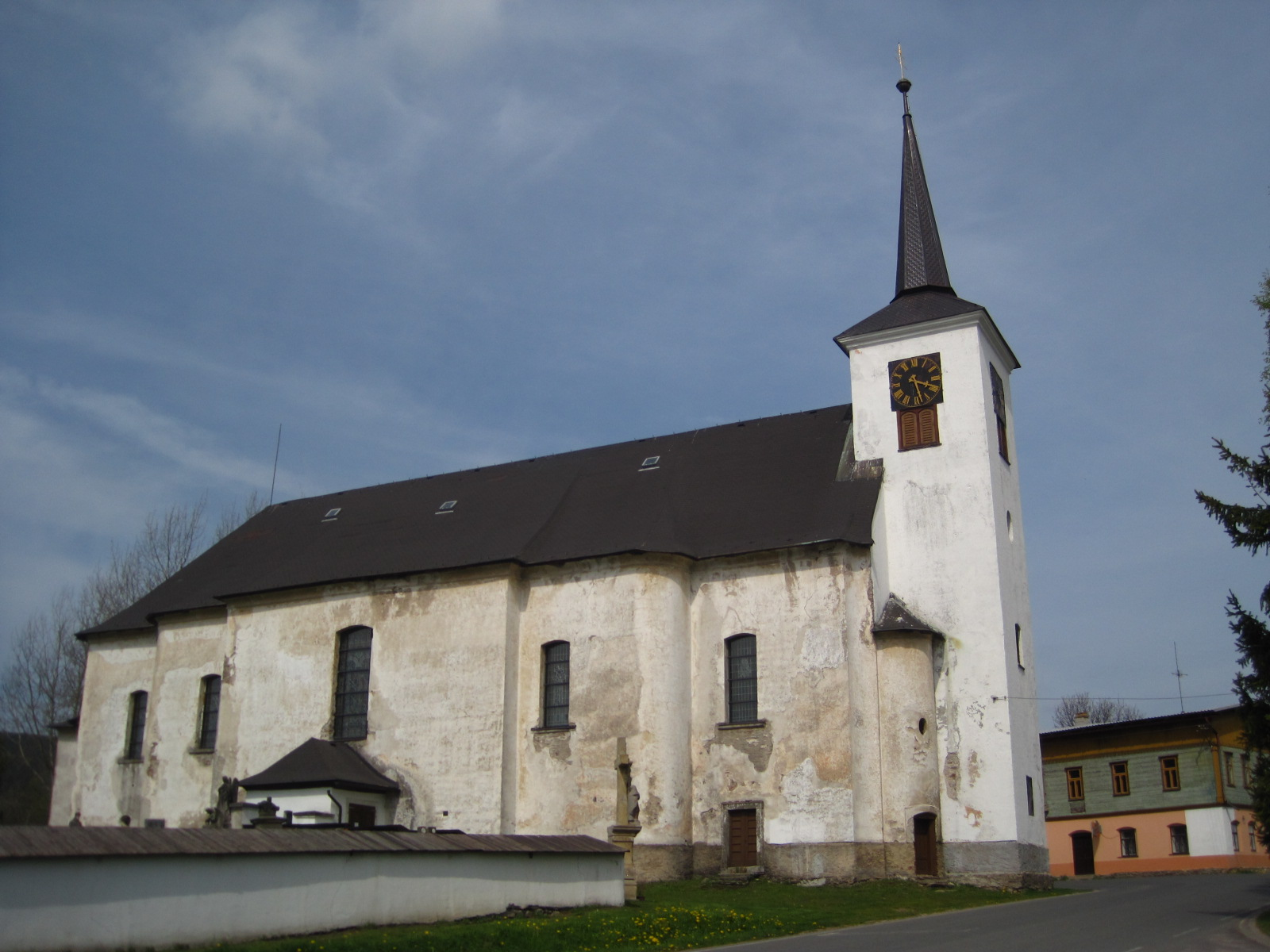 Kostel svatého Jana Křtitele, Kunštát (Orlické Záhoří).